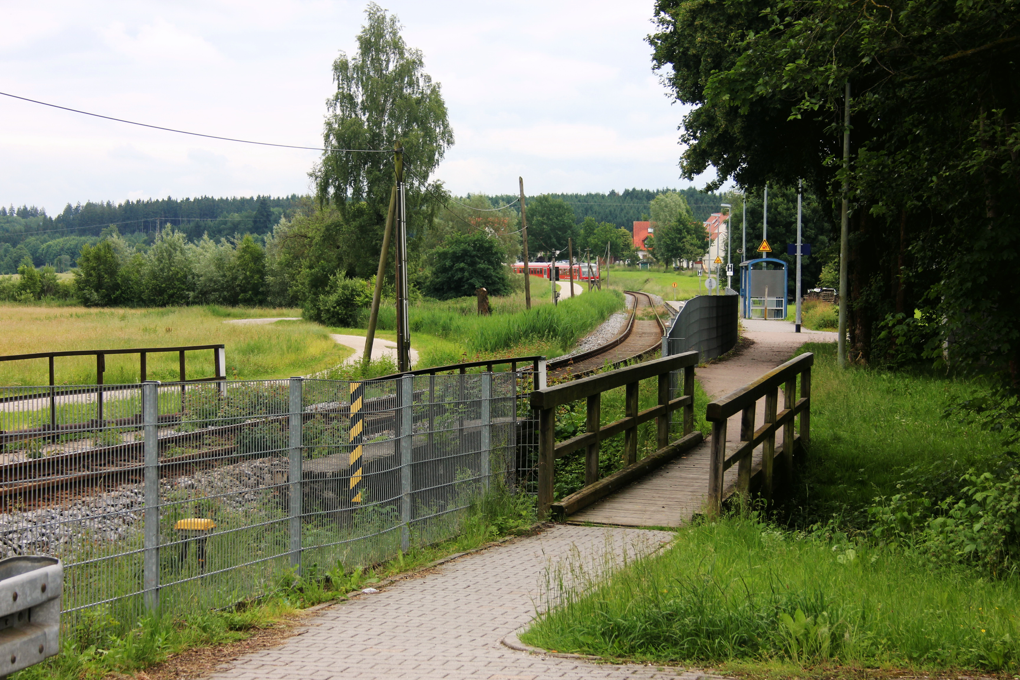 Bahnhof mit ausfahrendem Regionalzug in Kleinberghofen